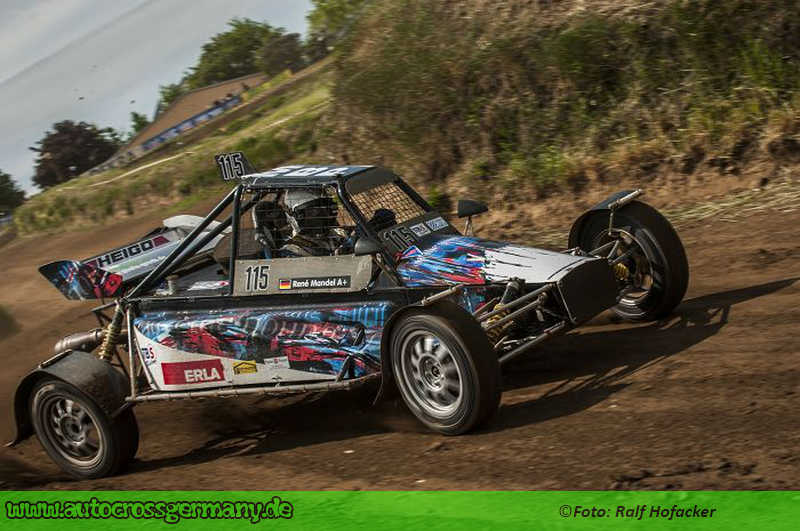 René Mandel Seelow 2014